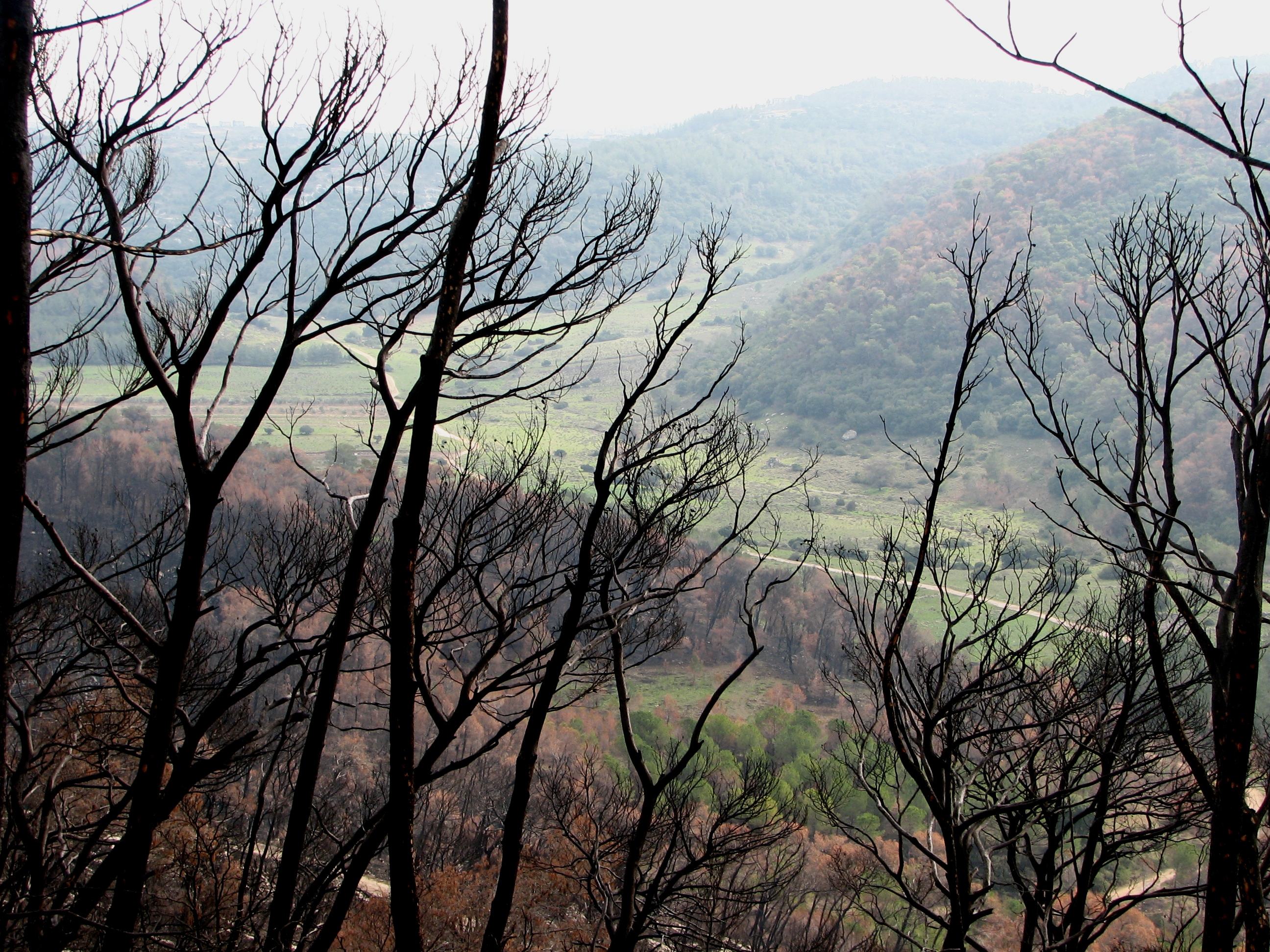 Mount Alon on mount Carmel Israel הר אלון על הכרמל נמצא בכרמל הגבוה בקעת אלון - תצפית מהר אלון . מבט לכוון דרום מערב לאחר השריפה בכרל בחודש דצמבר 2010